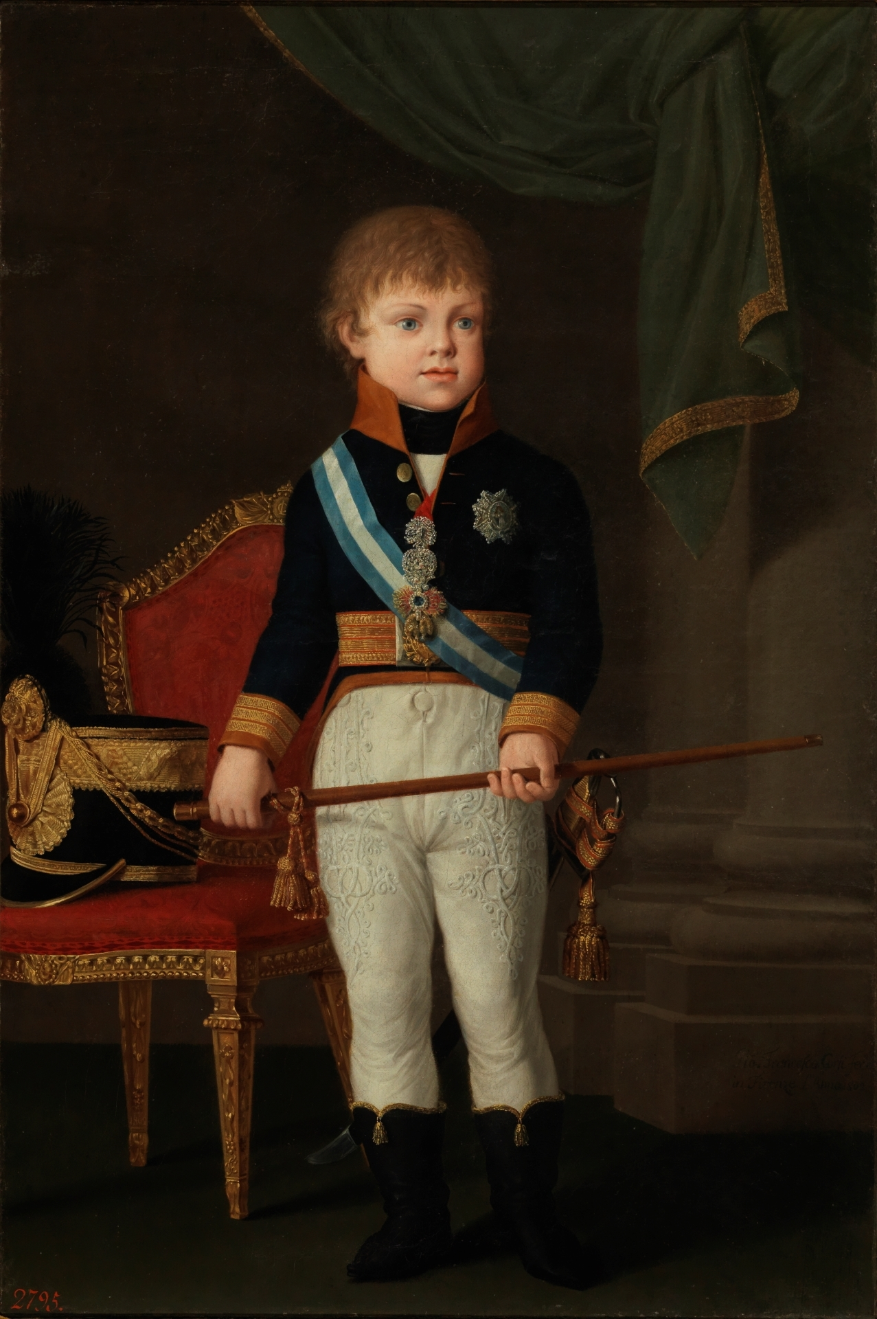 Carlo Ludovico de Borbón-Parma.